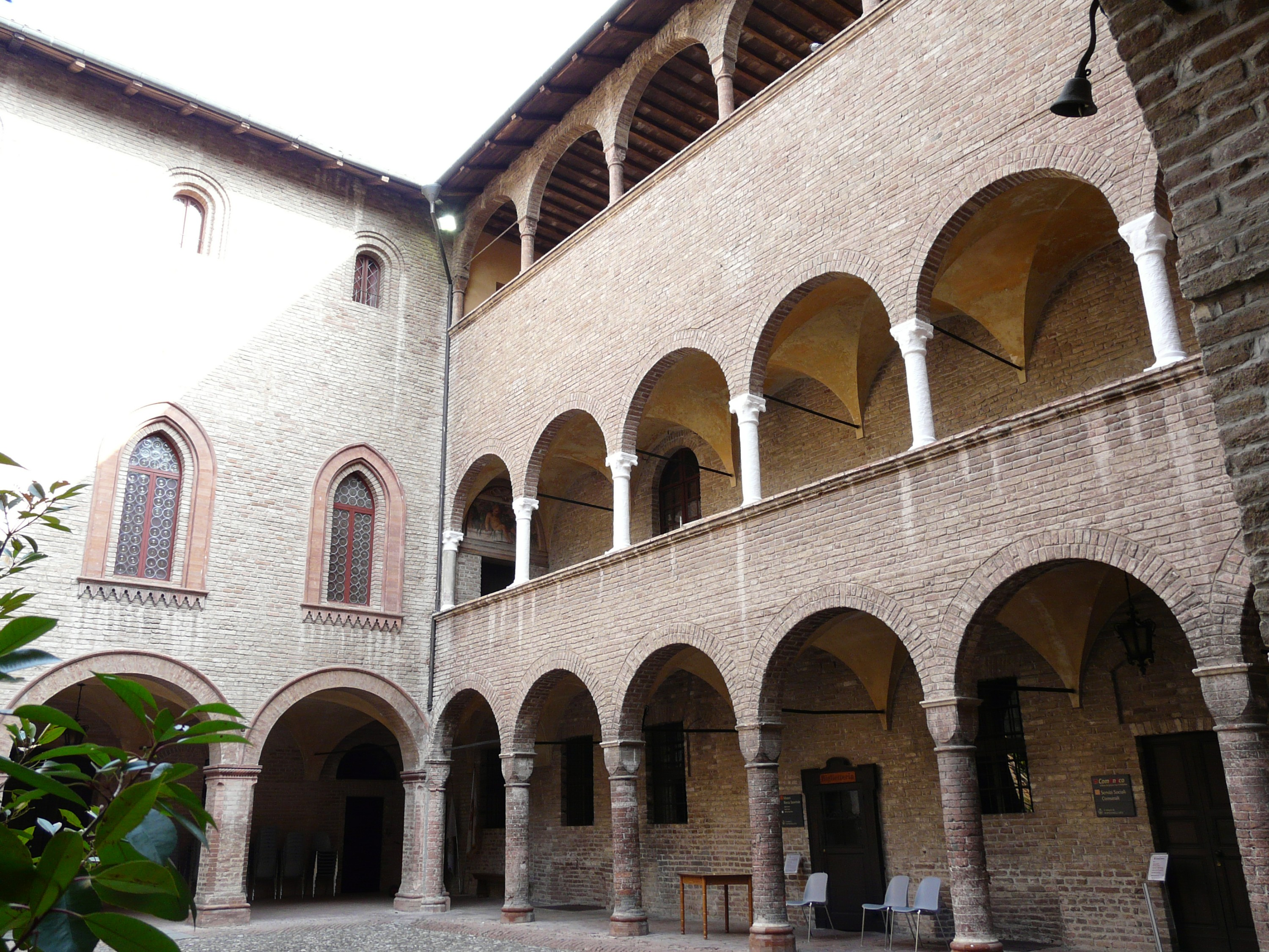 Immagini della Rocca Sanvitale di Fontanellato, Emilia-Romagna, Italia